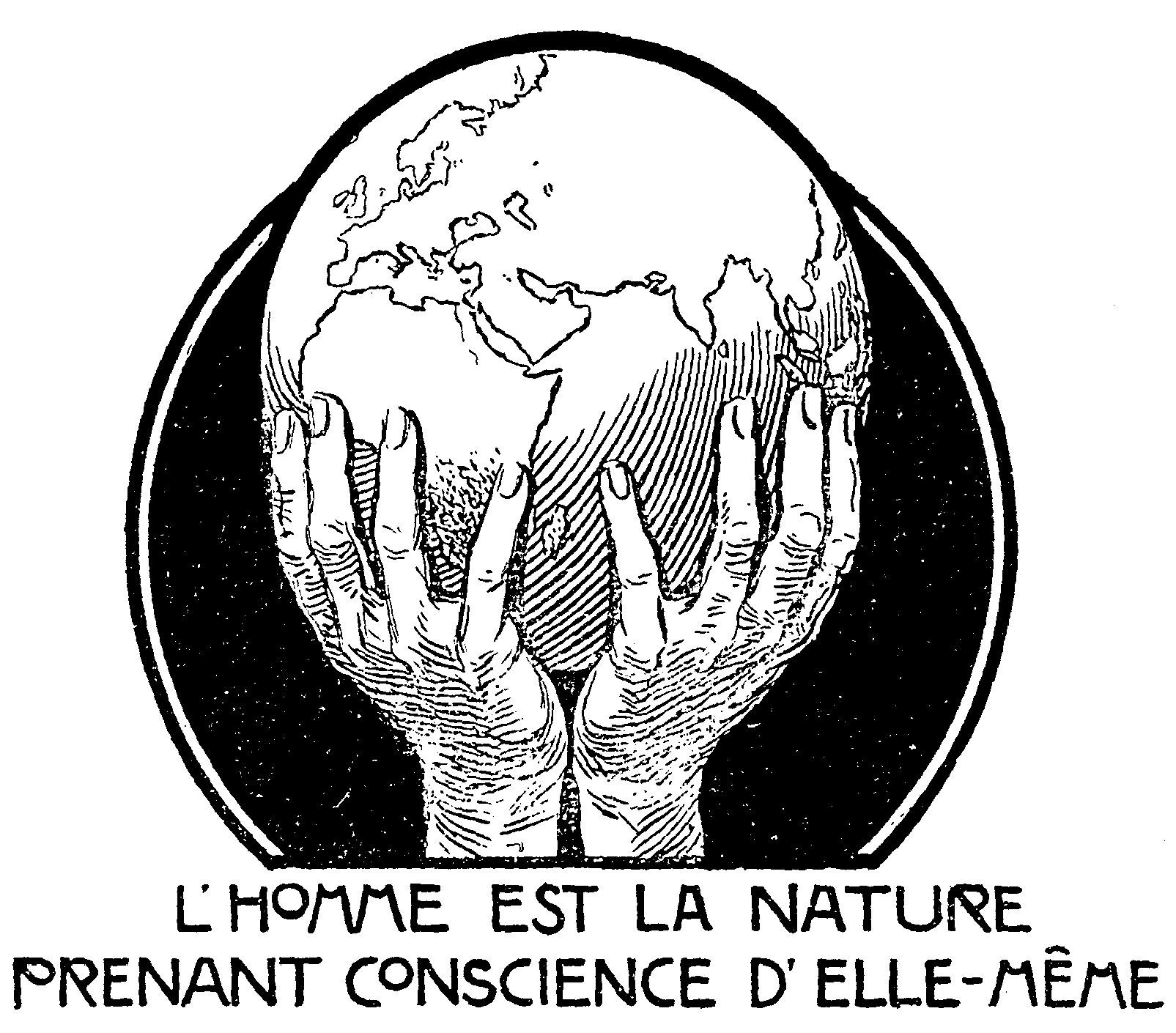 Ілюстрація до книги "Земля людей. Загальна географія" Жан-Жака Елізе Реклю видання 1905 року